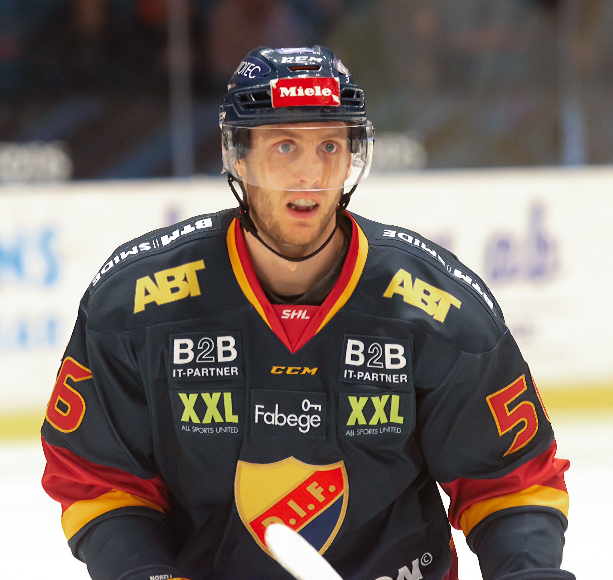 Djurgården-Färjestad 20190129